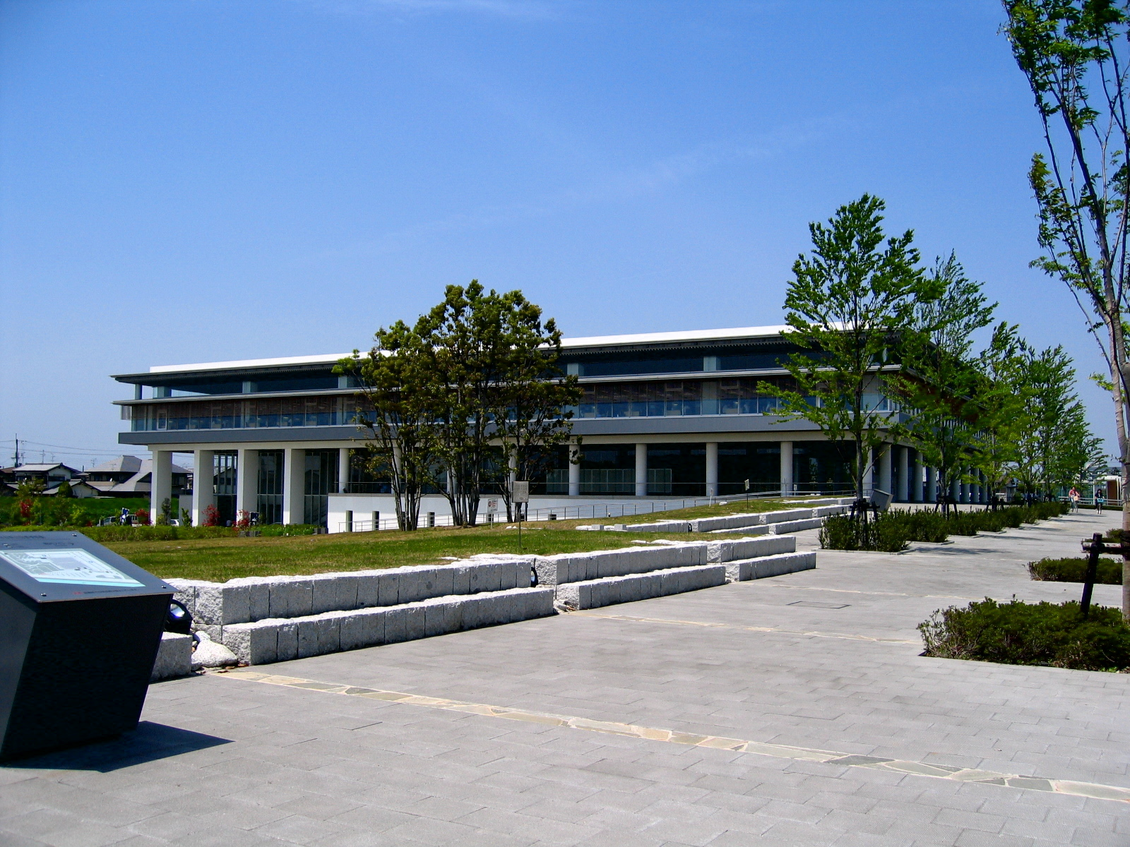 Nara Prefectural library(奈良県立図書情報館), Nara, Japan Taken by uplader User:Ideru April 2006